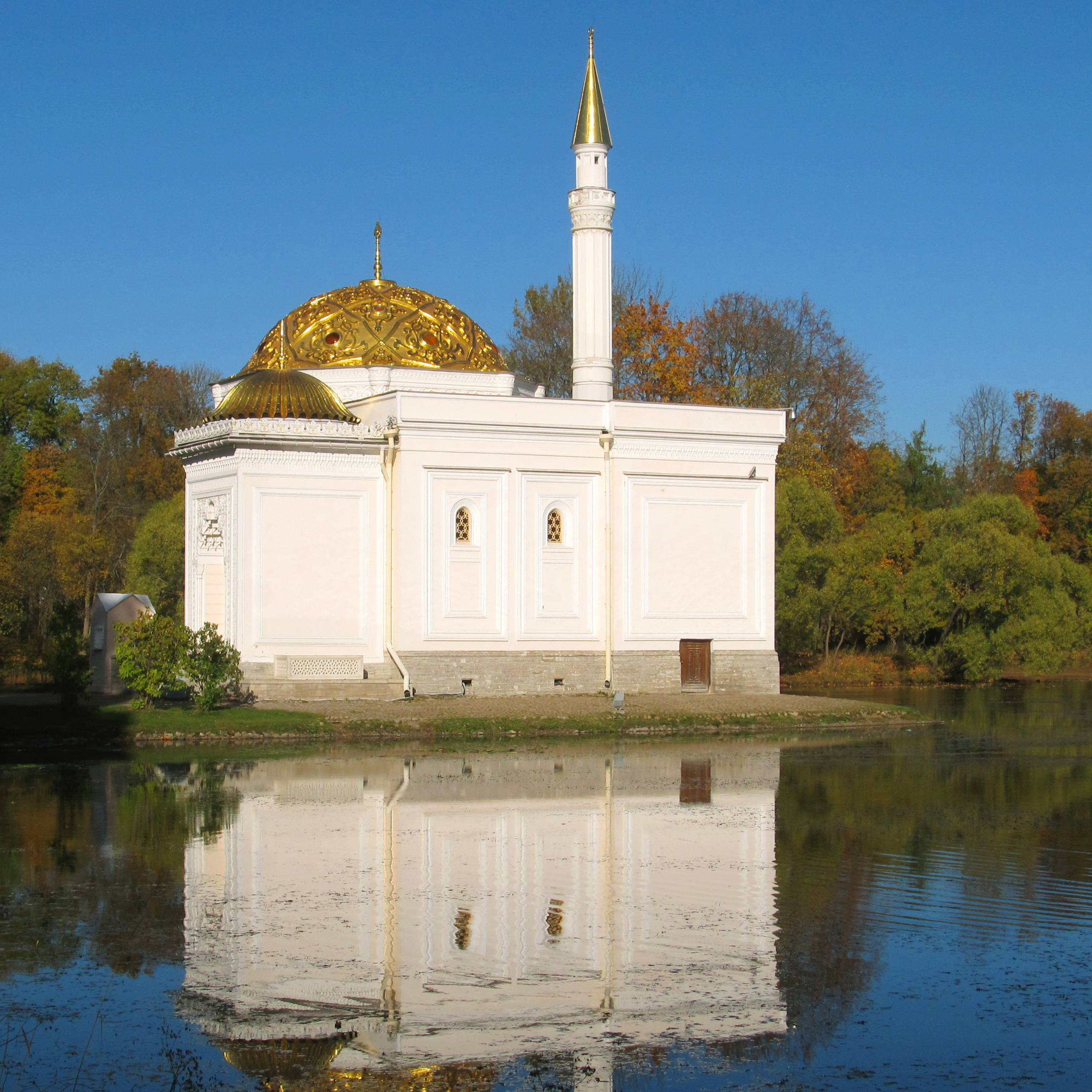 Царское село. Екатерининский парк. Турецкая баня. Осень. Отражение.